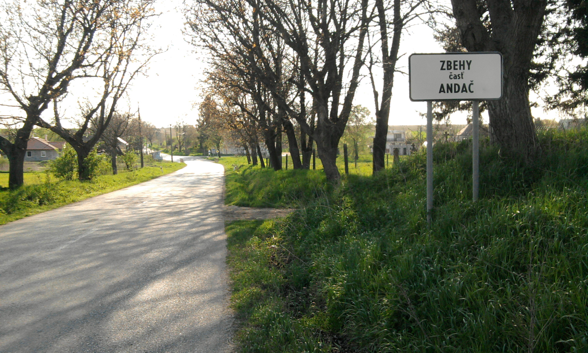 zbehy-andač